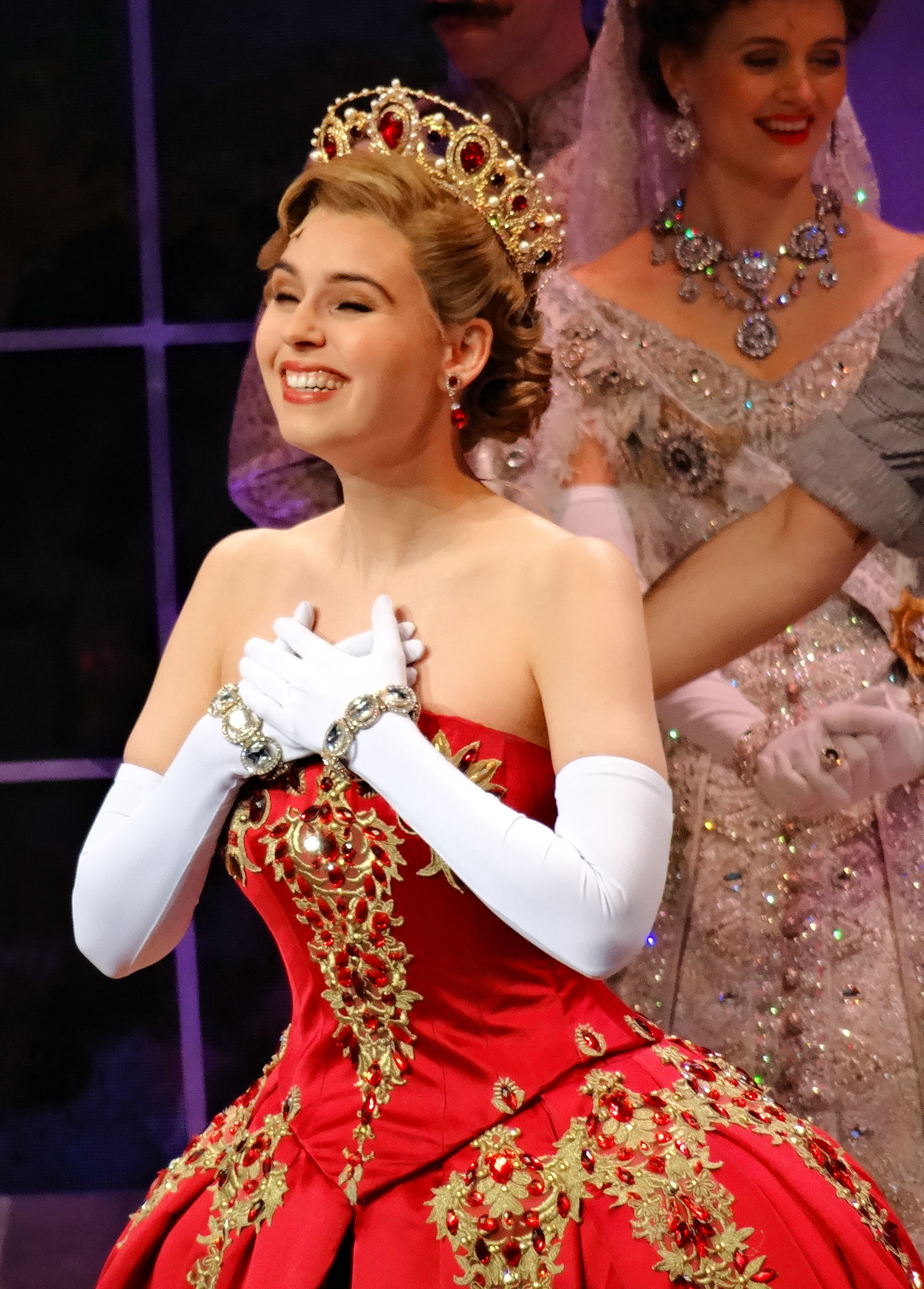 Tessa van Tol in Anastastia (Circustheater, 2020)